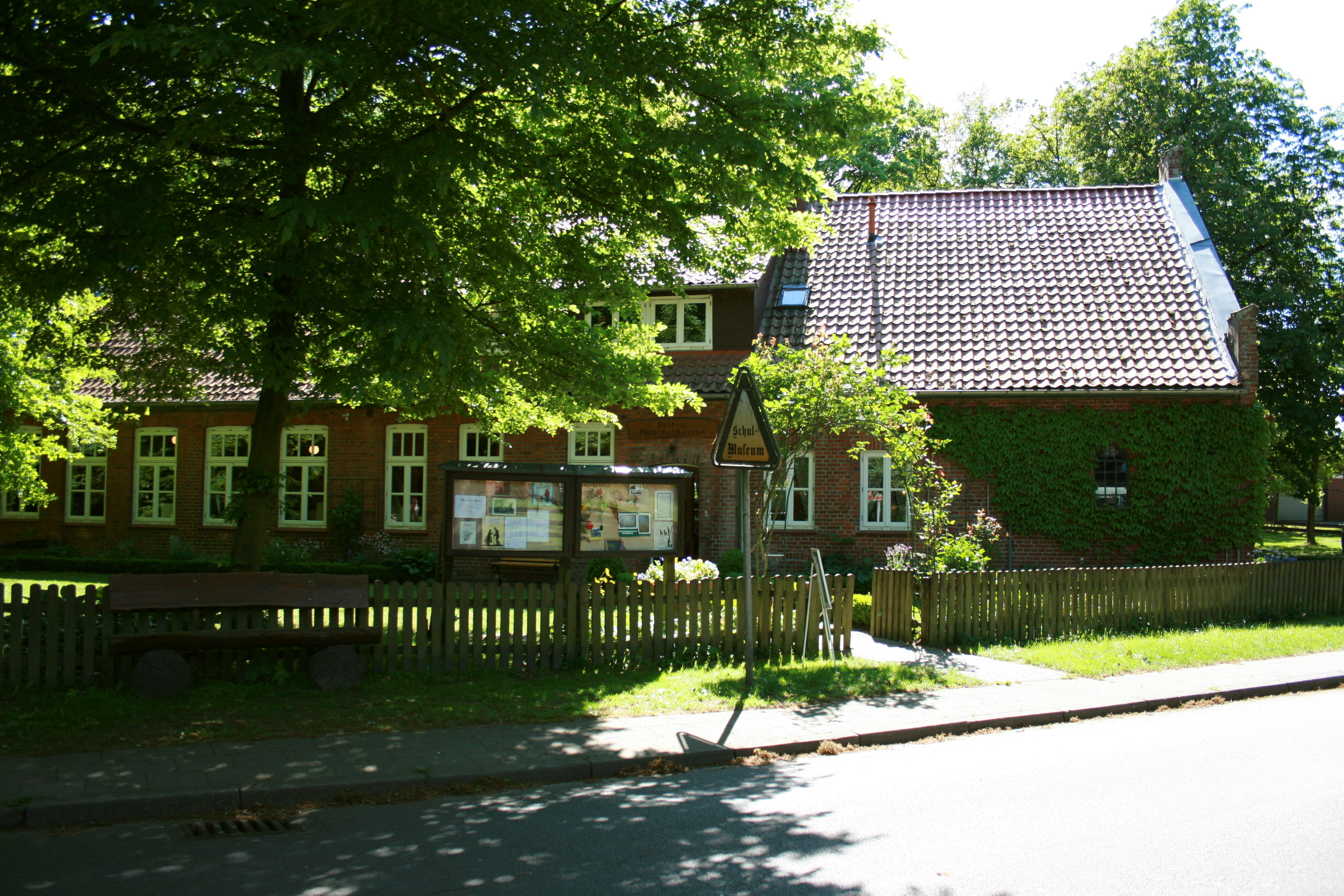 Pult- und Federkiel-Museum in Schneverdingen-Insel, Reinsehlener Weg 2